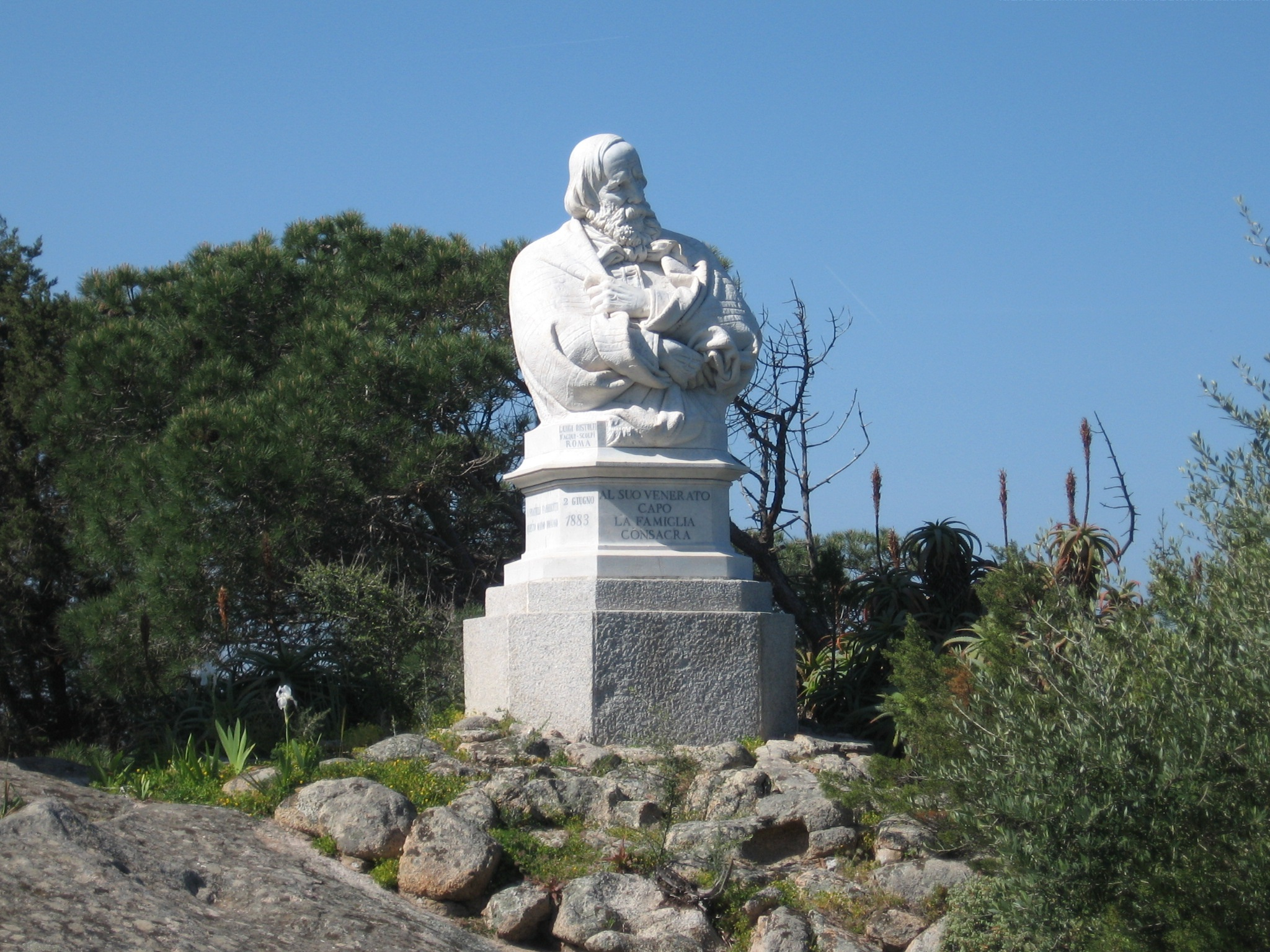 הפסל על הצוק